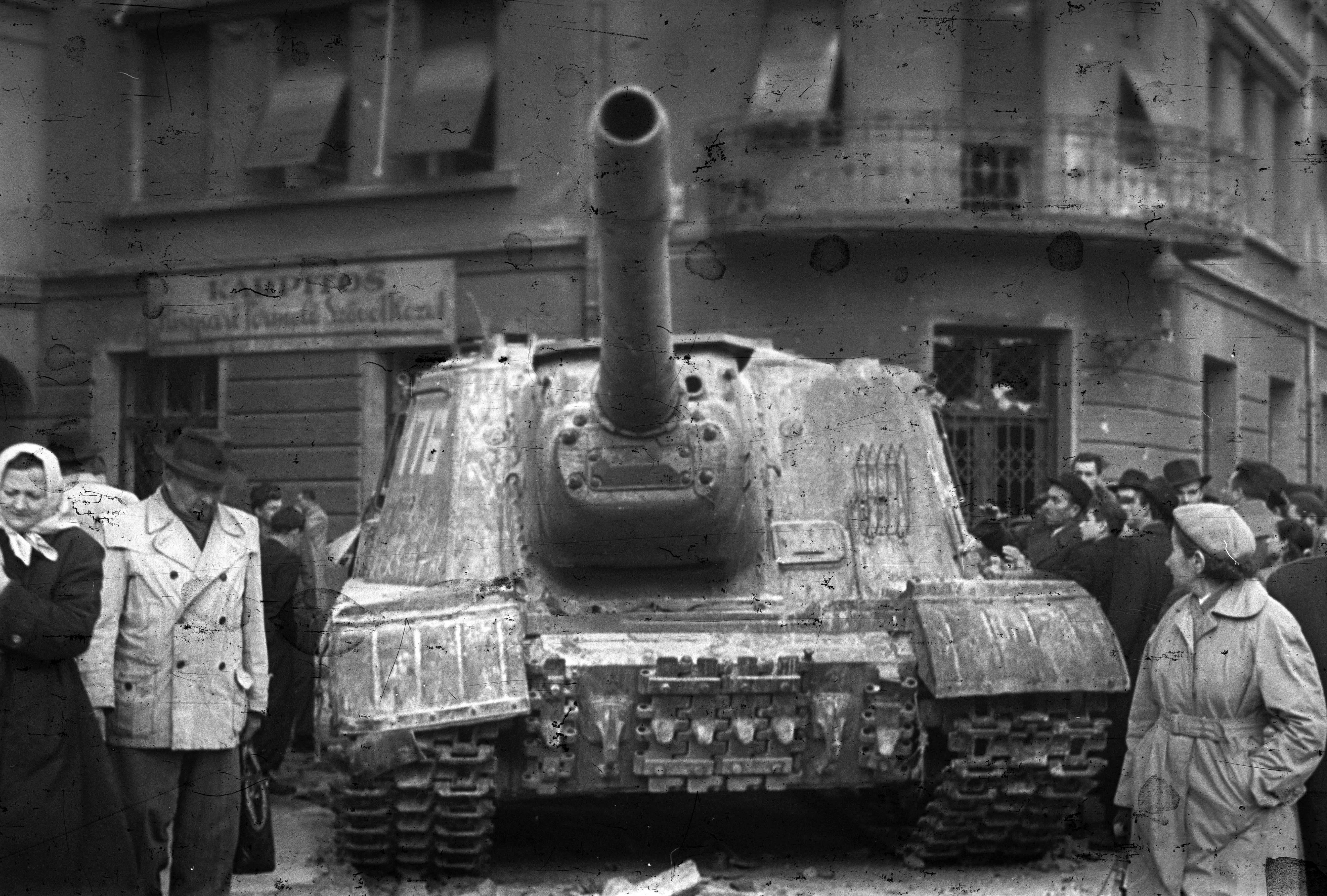 Déri Miksa - Fecske (Lévai Oszkár) utca sarok. Harcképtelenné tett ISU-152-es szovjet rohamlöveg. Location: Hungary, Budapest VIII. Tags: wreck, Soviet brand, upholsterer, combat vehicle, ISU-152 assault gun, Budapest, revolution Title: Déri Miksa - Fecske (Lévai Oszkár) utca sarok. Harcképtelenné tett ISU-152-es szovjet rohamlöveg.